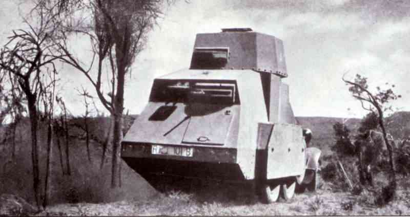 Fiat 611 fuga